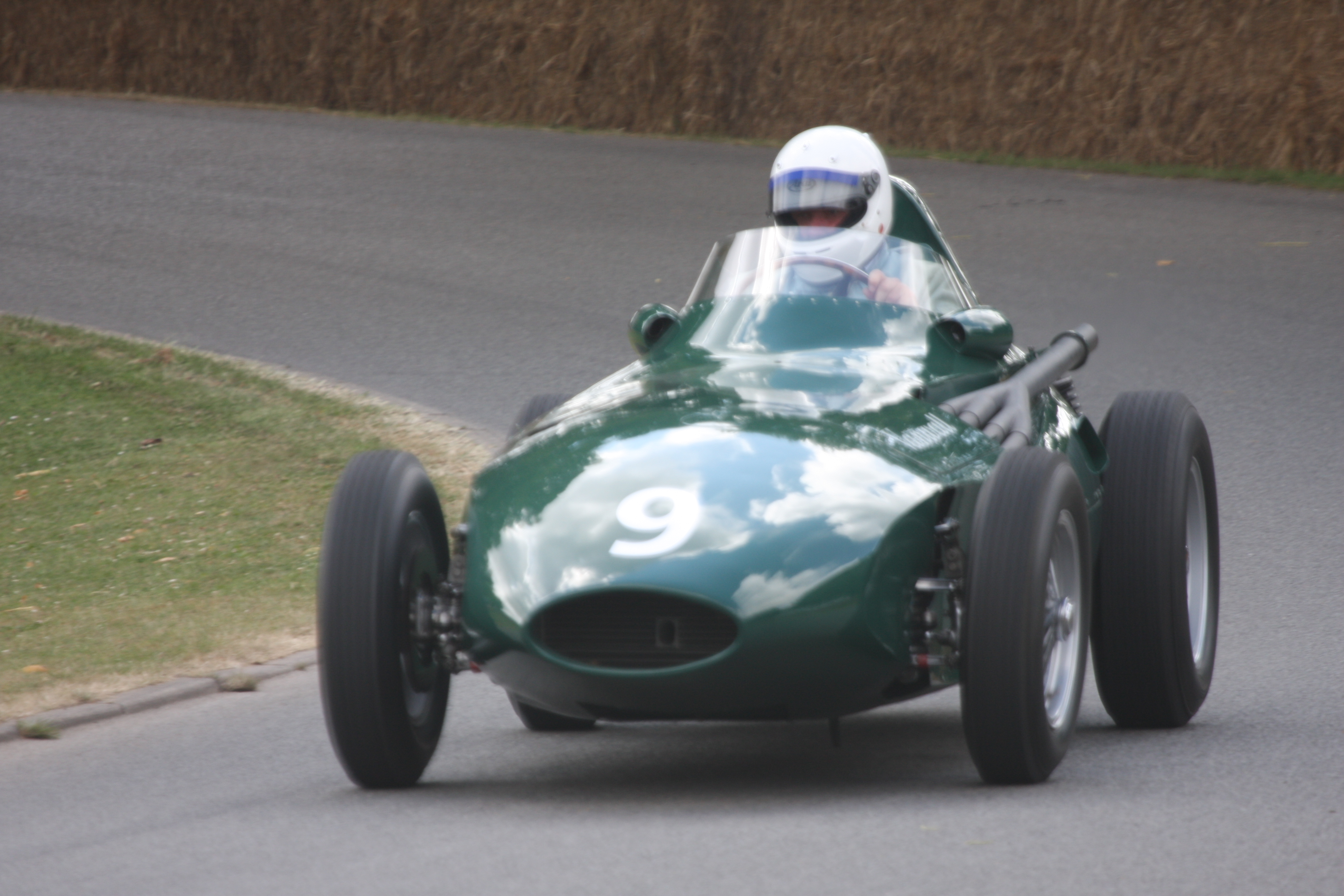 goodwood 2009